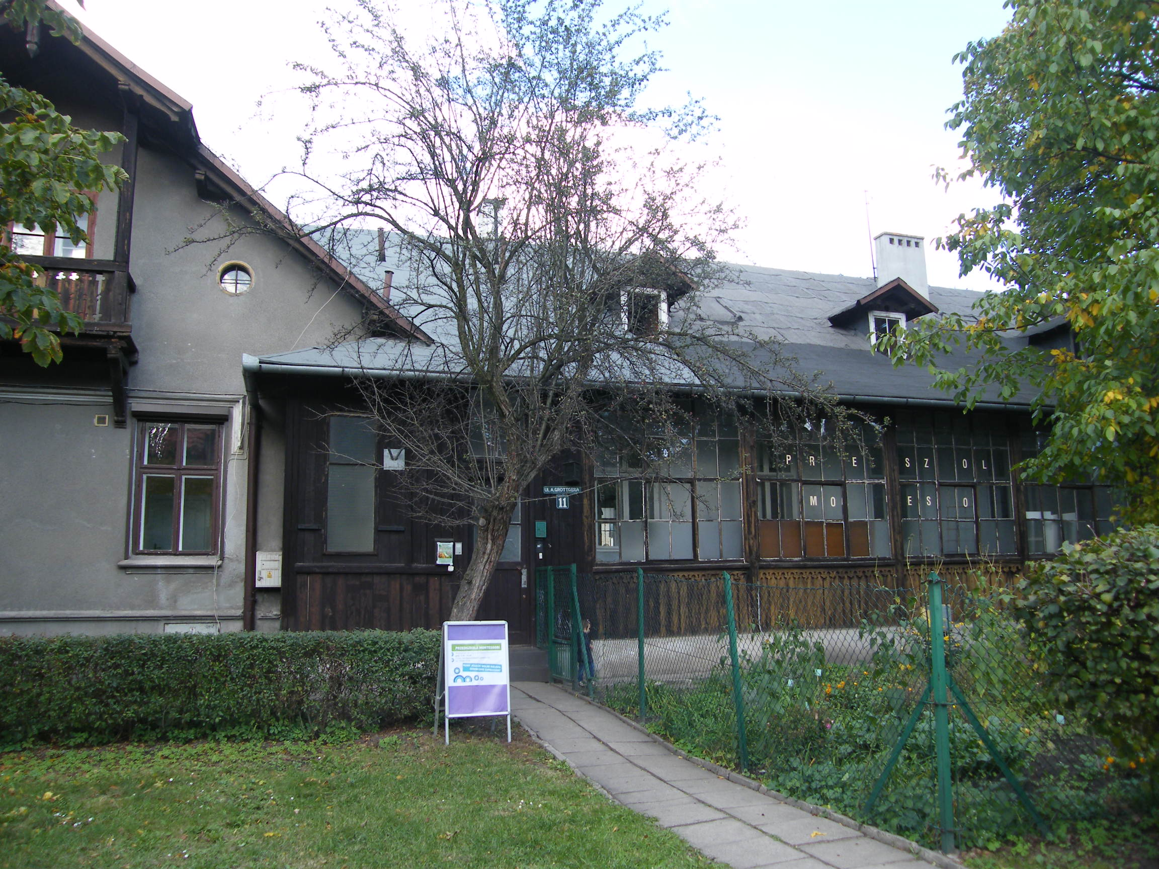 willa Heleny Modrzejewskiej "Modrzejówka", wejście od ulicy Grottgera 11 Kraków, ul. Grottgera 11, Kraków